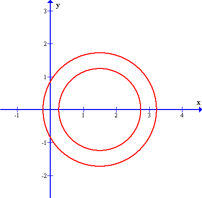 Owal Kartezujusza o parametrac: a = 1.5, b = 0, c = 0.5